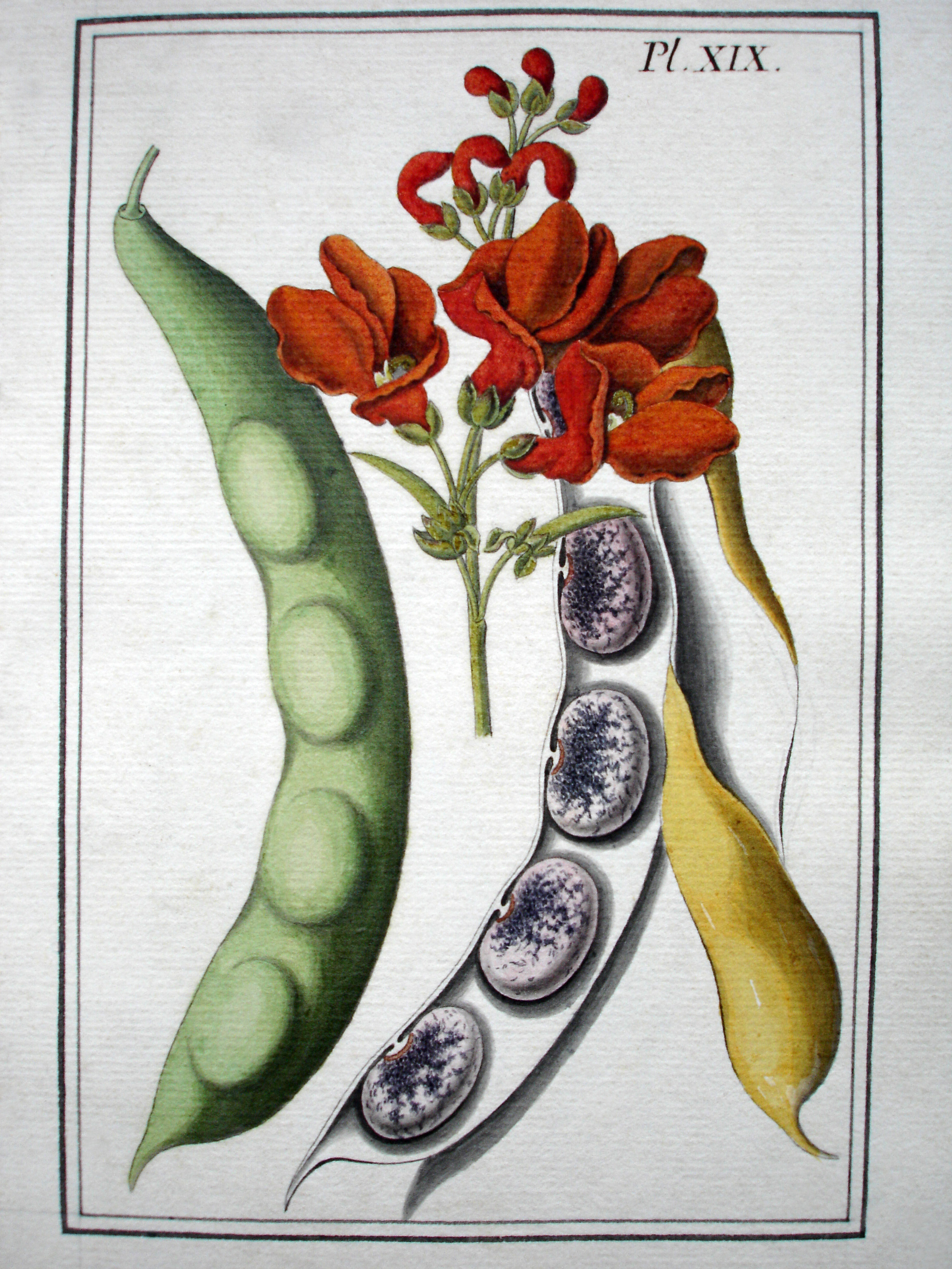 Planche XIX. Haricot-fève gris, Haricot d'Espagne